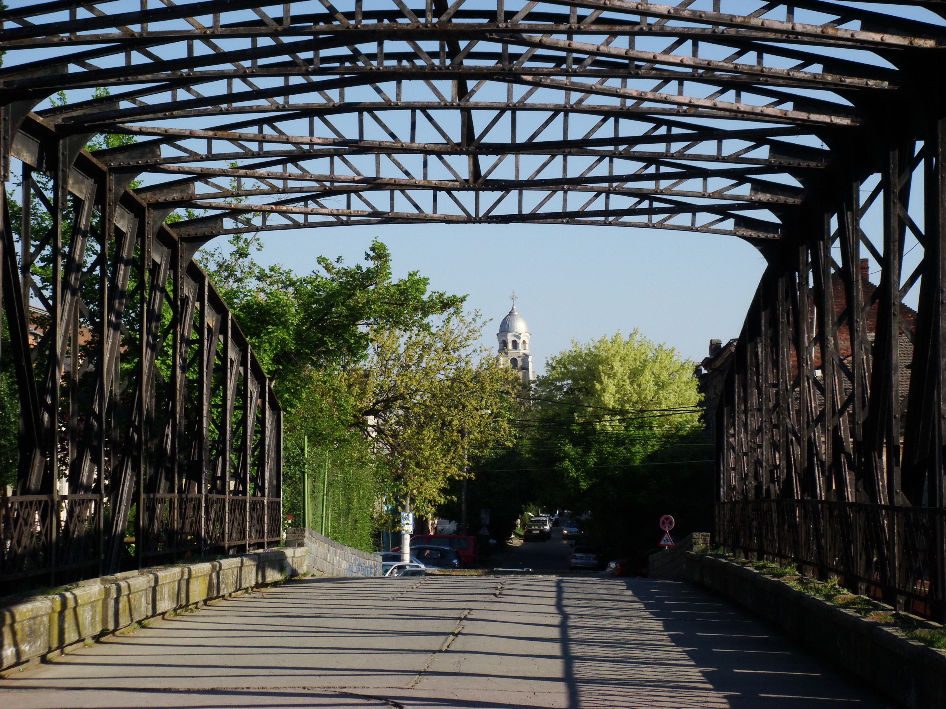 Pod metalic (adus pe actualul amplasament în 1914); în fundal - biserica ortodoxă română ("Catedrala Veche") cu hramul "Adormirea Maicii Domnului")